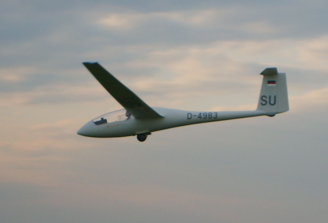 Fahrwerk